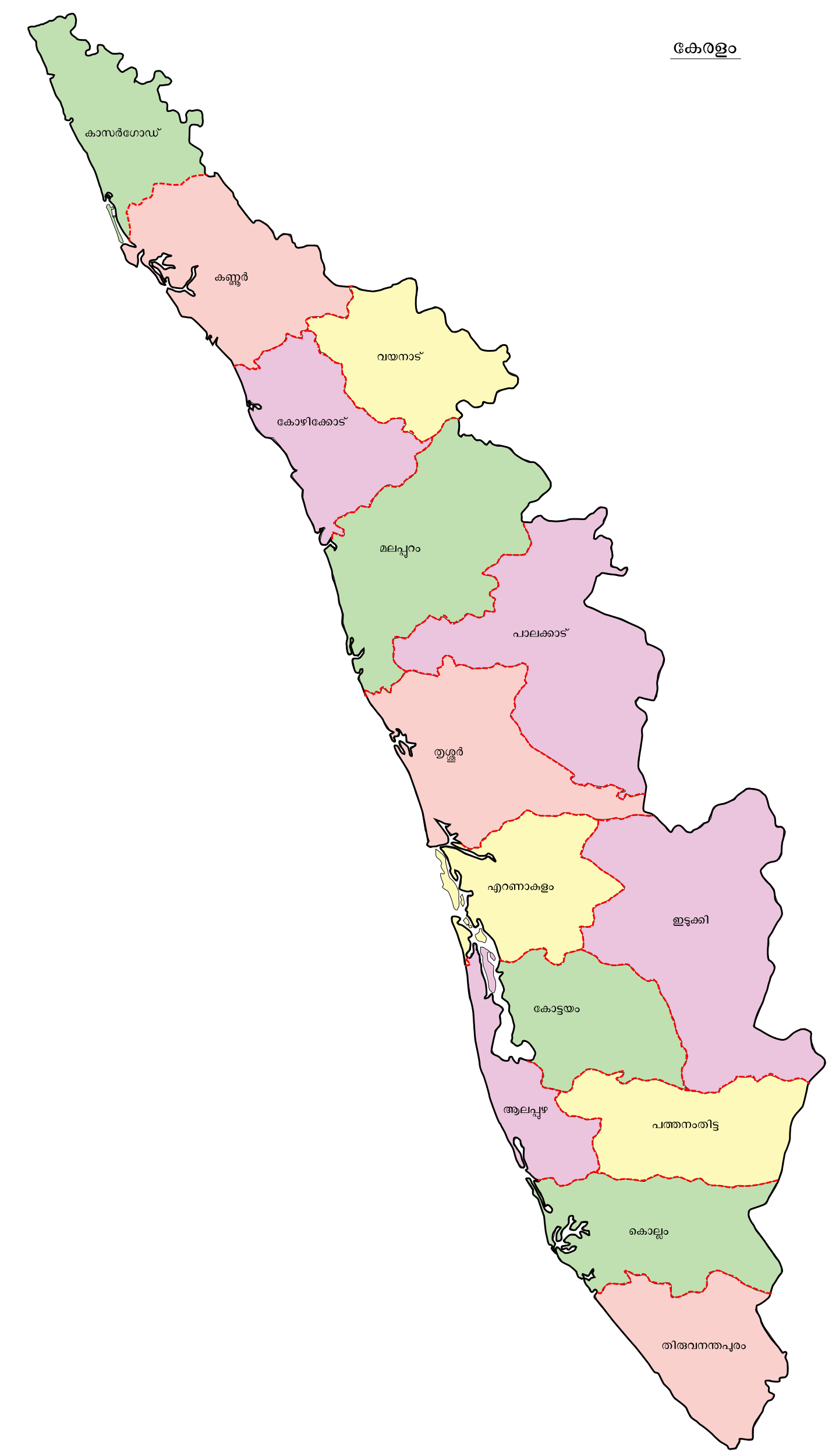 കേരളത്തിന്റെ ജില്ലാതല മാപ്പ്